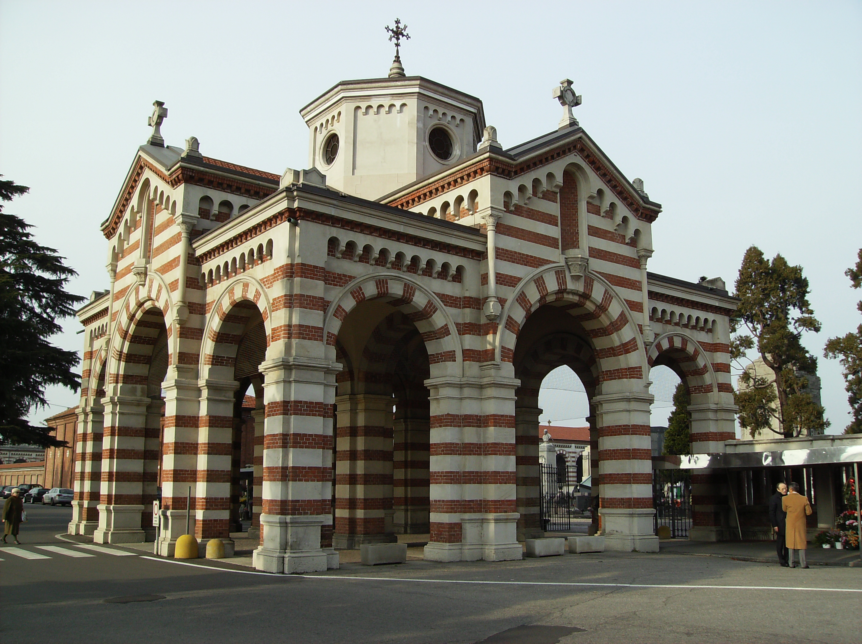 Ingresso Principale Cimitero Monumentale di Busto Arsizio